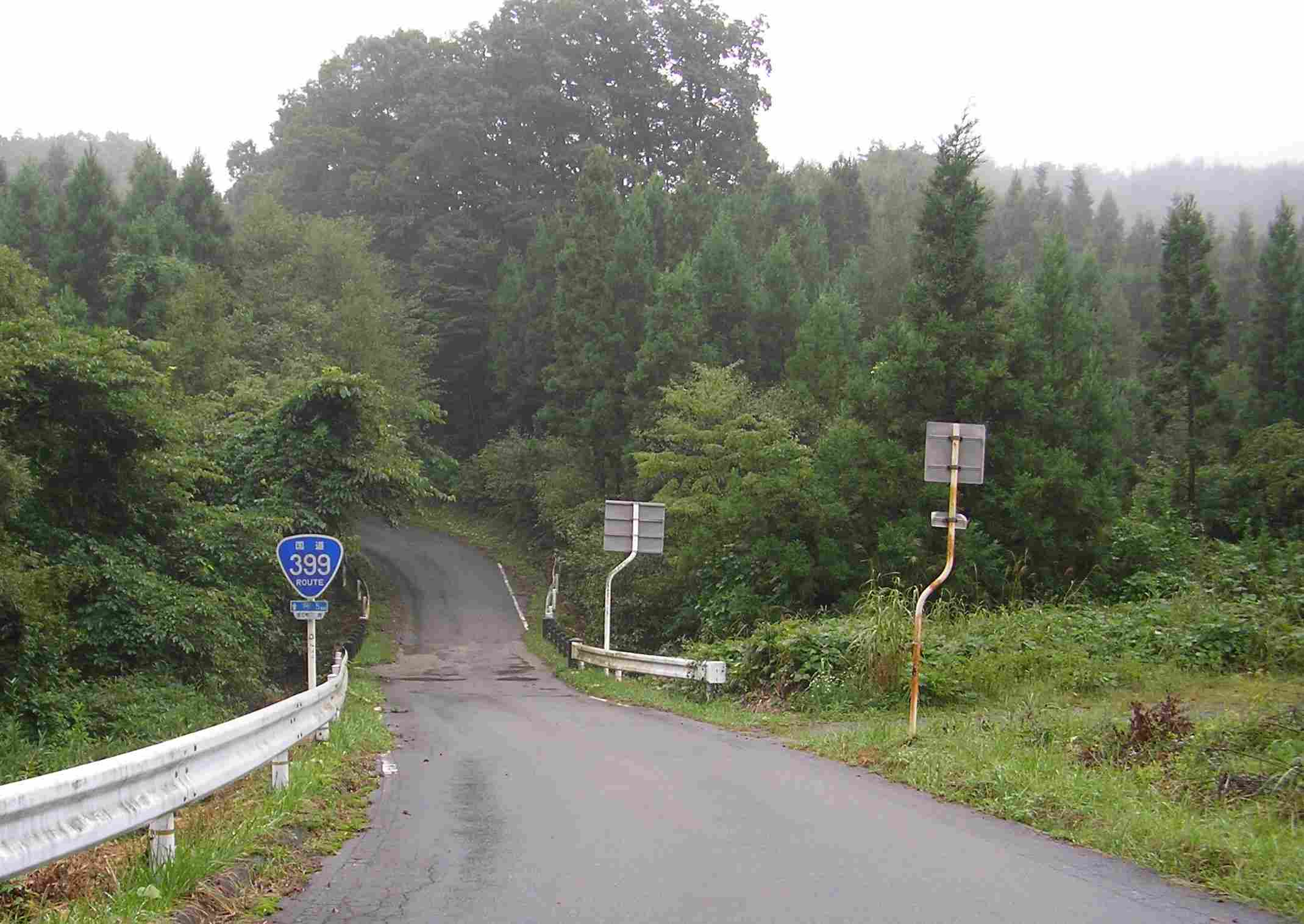 国道399号、福島県浪江町にて。阿武隈高地を縦断するルートでは、このような狭隘路が延々と続く。道が狭いため、大型の国道標がひどく大きく見える。2007年9月